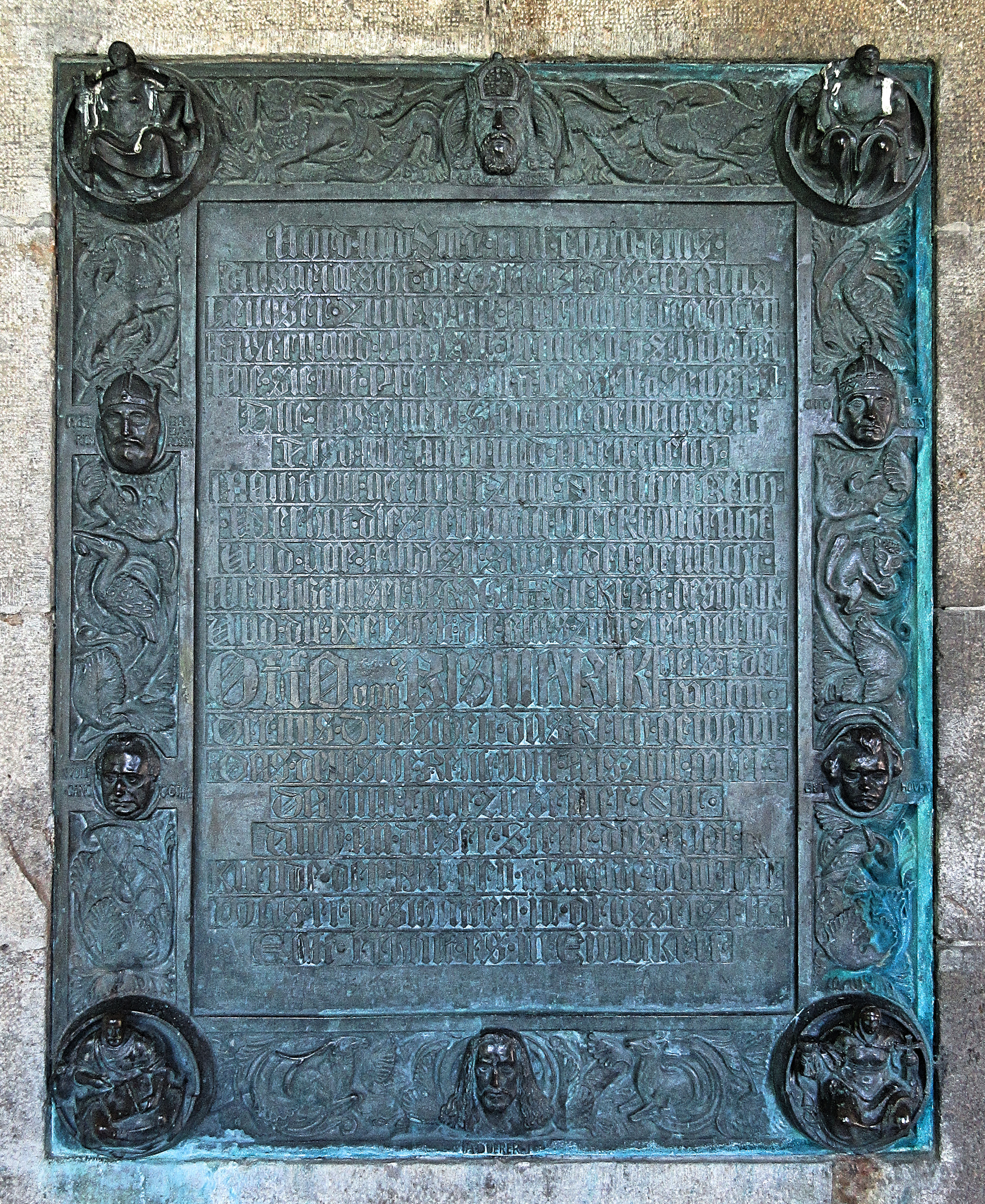 Bronzetafel in der Arkadenhalle (Nordseite) des Bismarckturms bei Assenhausen oberhalb des Ostufers des Starnberger Sees